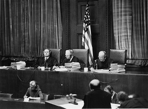 The members of the Tribunal at the Ministries Trial, Jan 6, 1948 - Nov 18, 1948, Nuremberg, [Bavaria] Germany, Seated from left to right are Leon W. Powers, Presiding Justice William C. Christianson, and Robert F. Maguire. – Die Mitglieder des Gerichts im Wilhelmstr.-Prozess in Nürnberg, 6. Januar 1948 – 18. November 1948 in Nürnberg (Bayern), Deutschland, Die Mitglieder des Gerichts, Sitzend von links nach rechts: Leon W. Powers, Vorsitzender Richter William C. Christianson, und Robert F. Maguire.